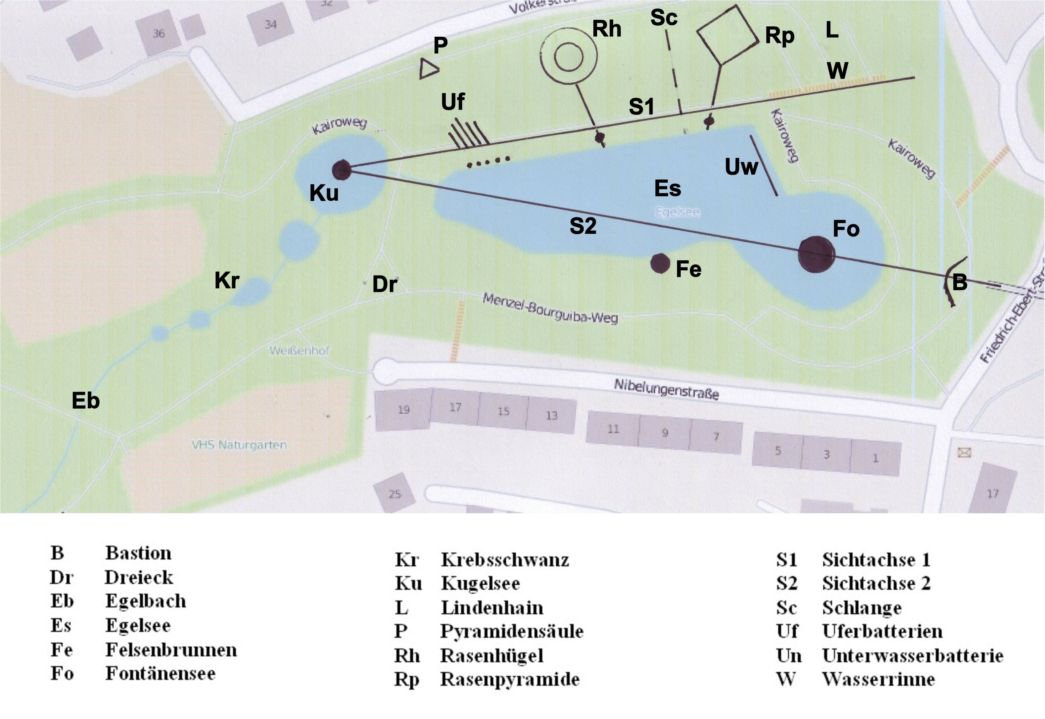 Lageplan des Egelsees in Stuttgart. Der Plan basiert auf einer OpenStreetMap-Karte.